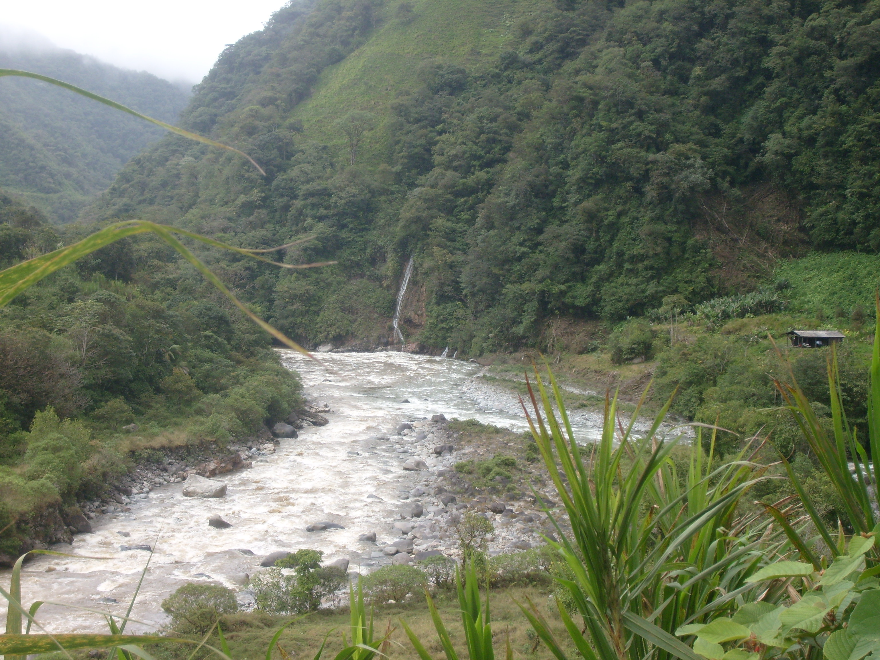 Desembocadura del río afiladores en el Sucio a la altura de la vereda La Playa, corregimiento de Monopamba (Puerres)